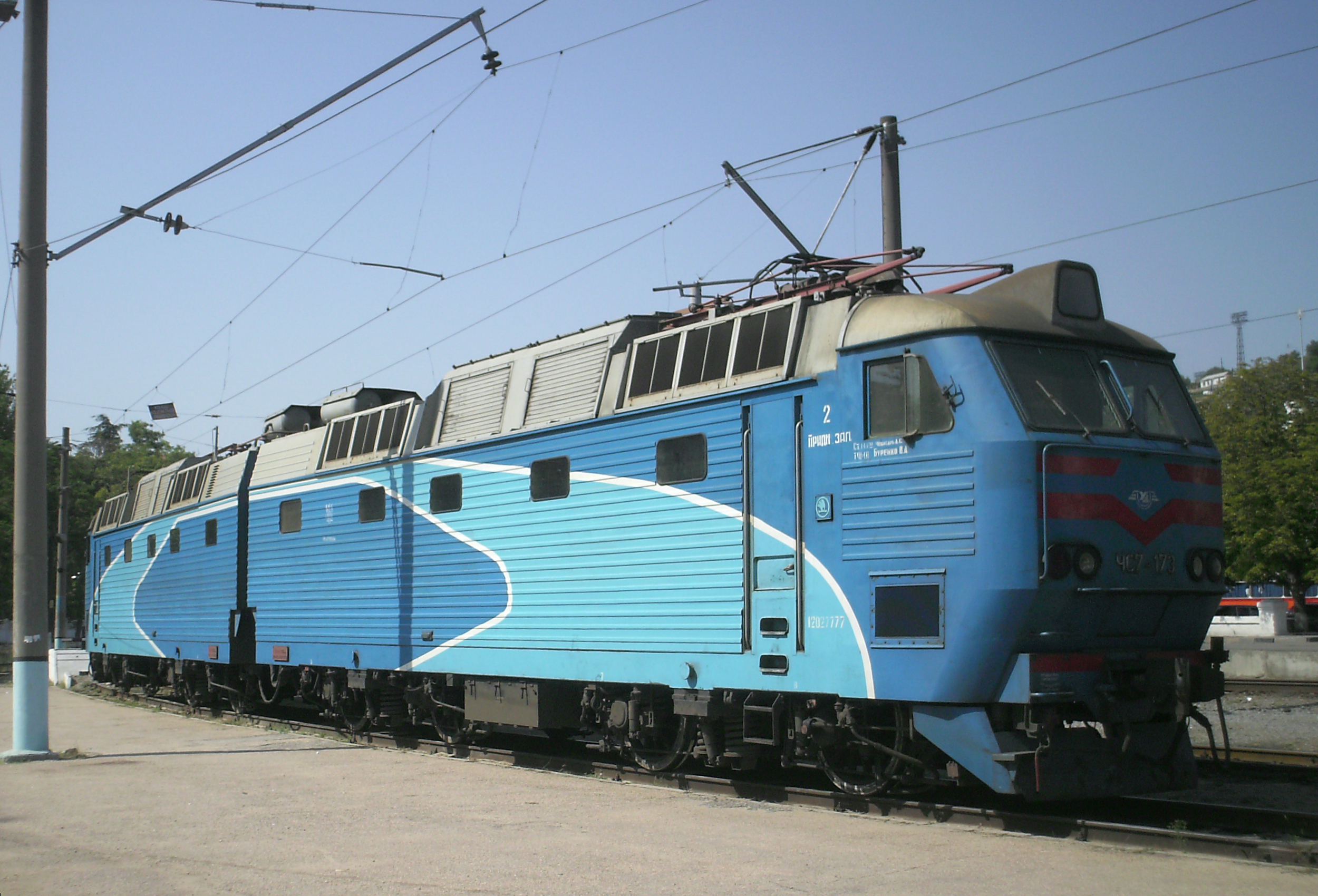 на станции Севастополь